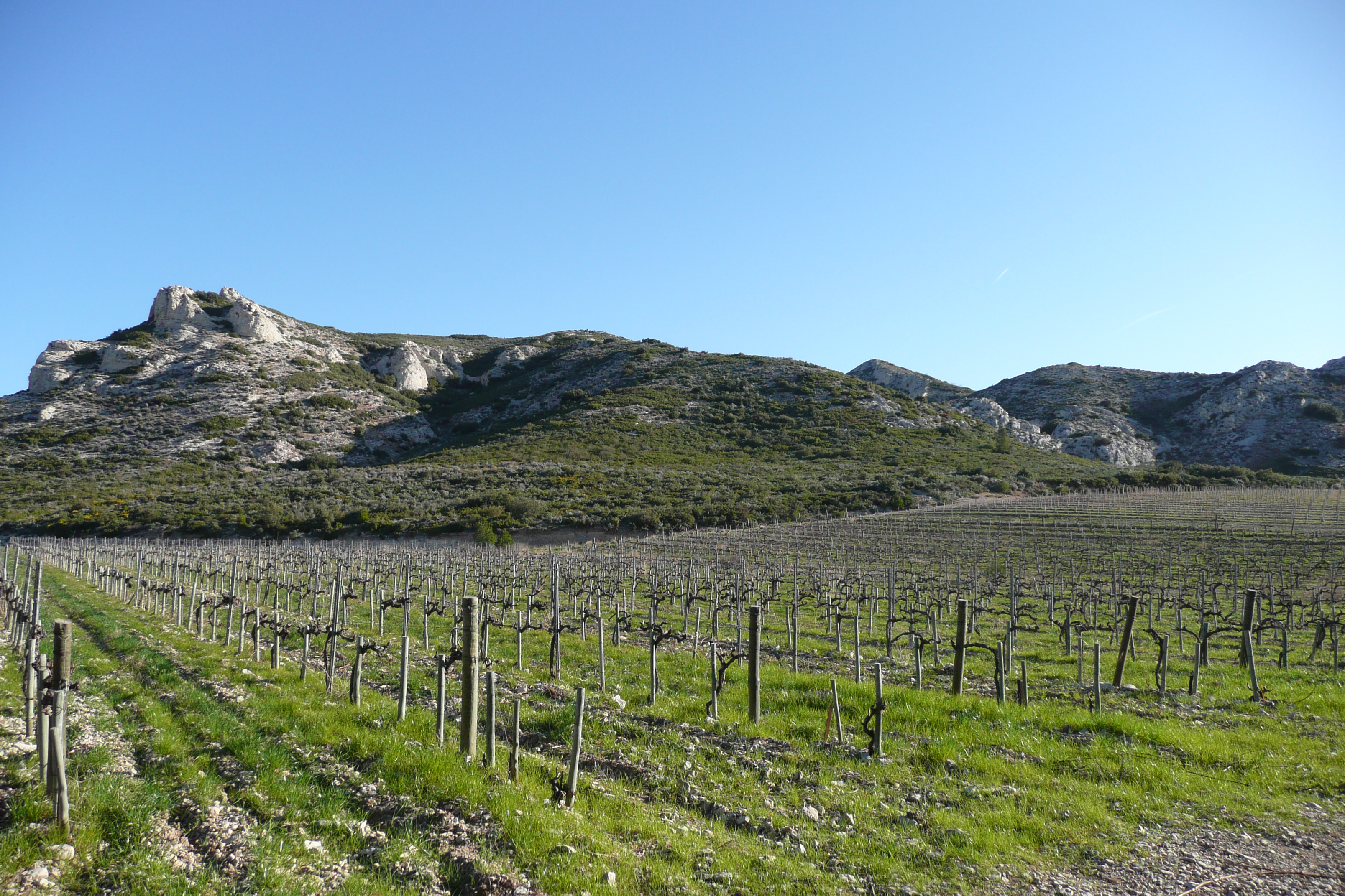 Les Alpilles près de Maussane-les-Alpilles.